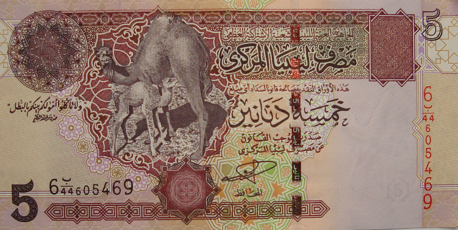 Libya - 5 dinars